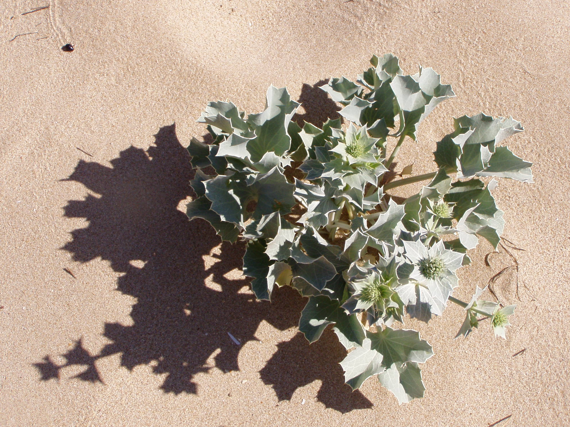 Seaside Eryngo (